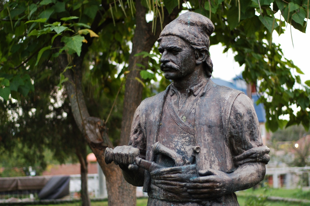 Spomenik Jovanu Kursuli ispred osnovne i srednje škole u Varvarinu